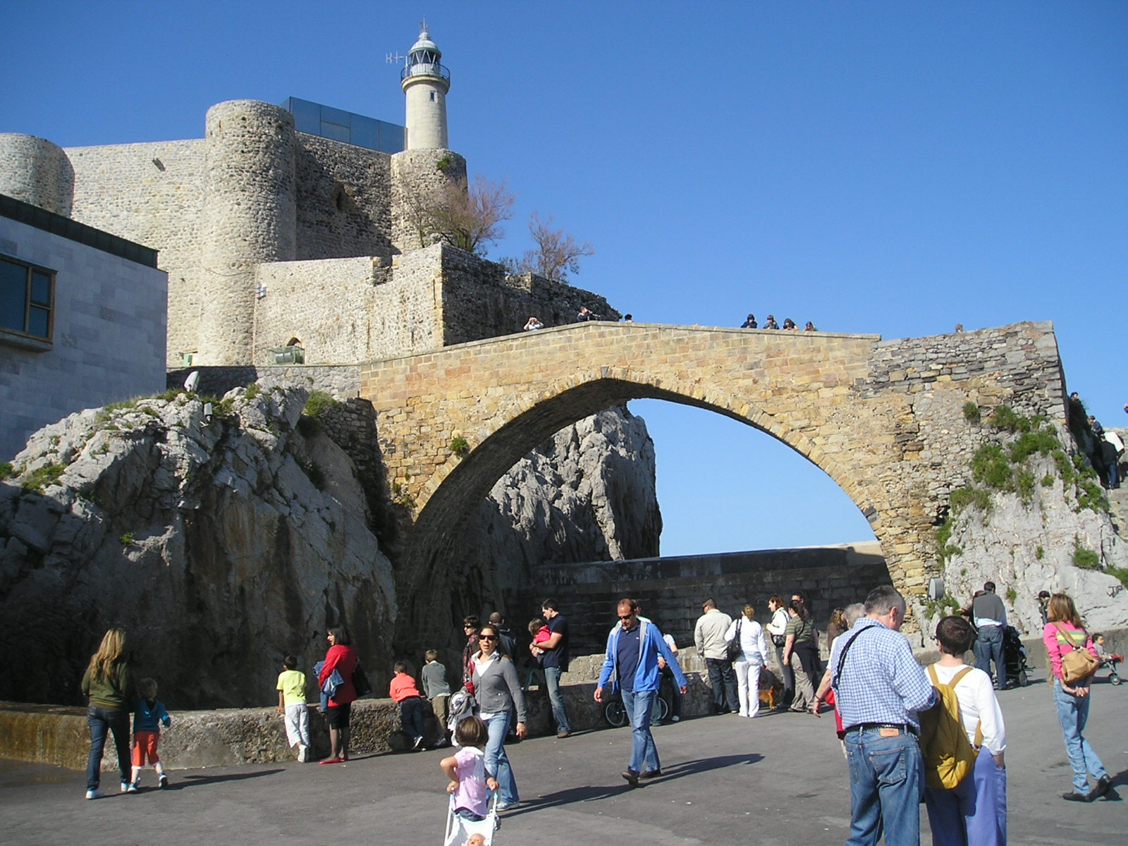 Faro del castillo de Santa Ana, en Castro Urdiales, Cantabria (España).